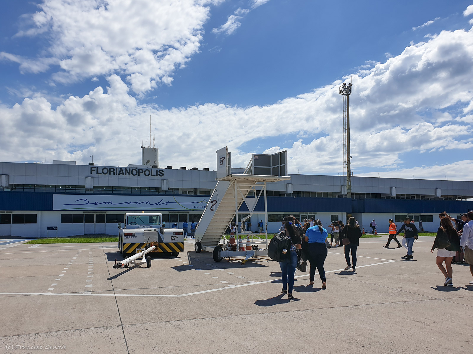 Antigo Terminal do Aeroporto Hercílio Luz, em Florianópolis, visto da pista, com viajantes vindos de um voo caminhando do avião até ele.